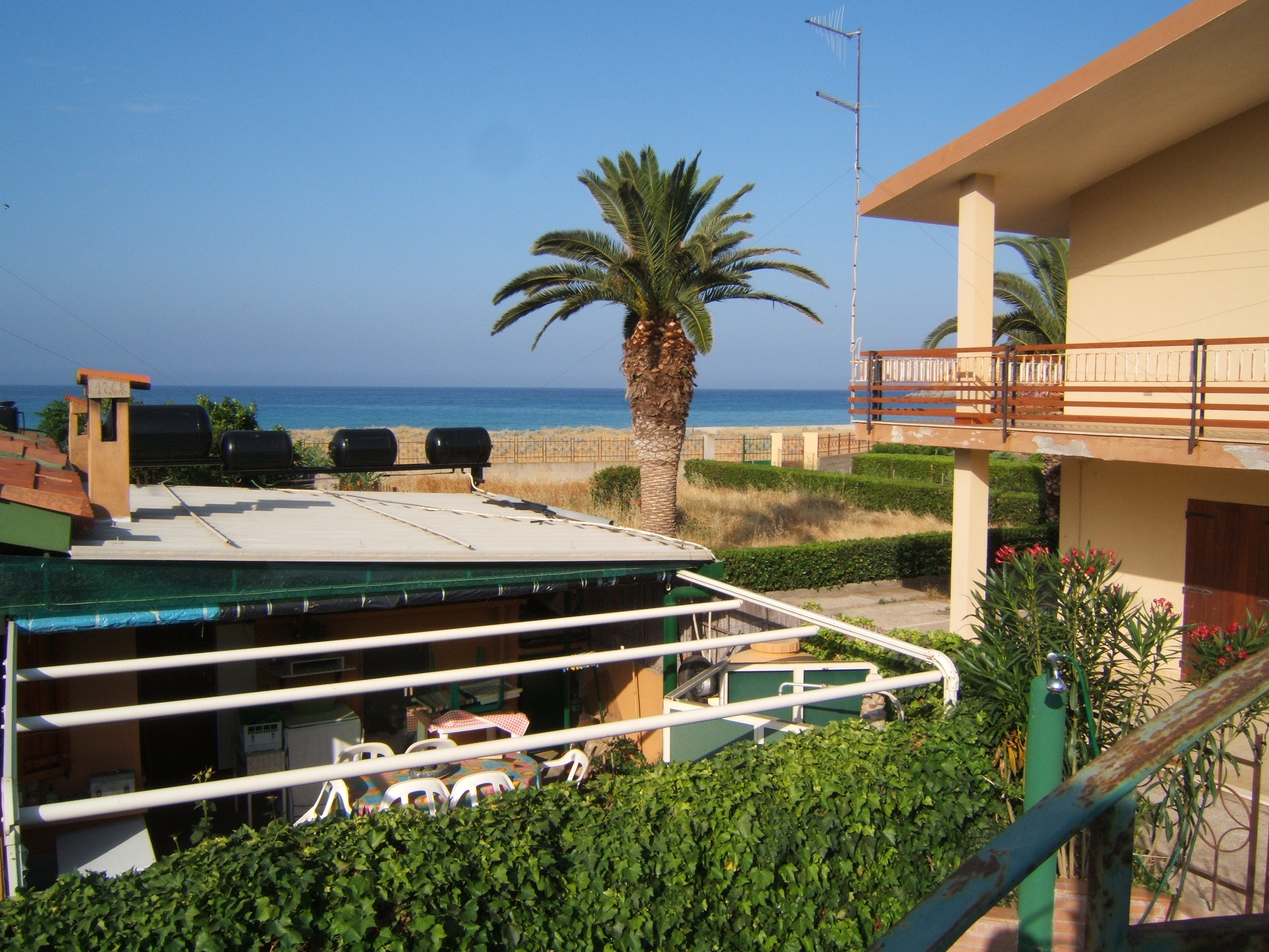 Solanas